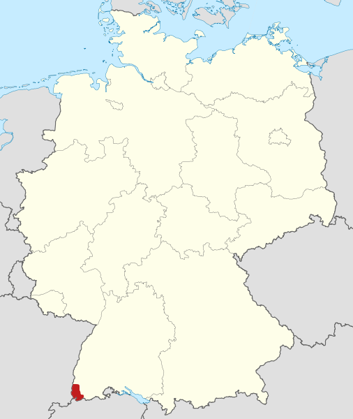 Lage des Markgräflerlands in Deutschland